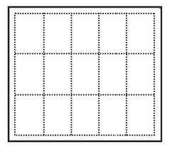 Схематическое изображение рамочной зубцовки почтовой марки